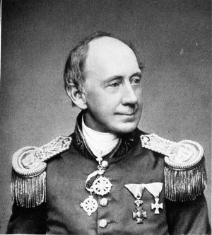 Georg Friedrich Ziebland, bayerischer Architekt und Baumeister